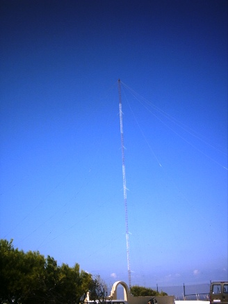 Antenna trasmittente Loran-c - Slave 7990X